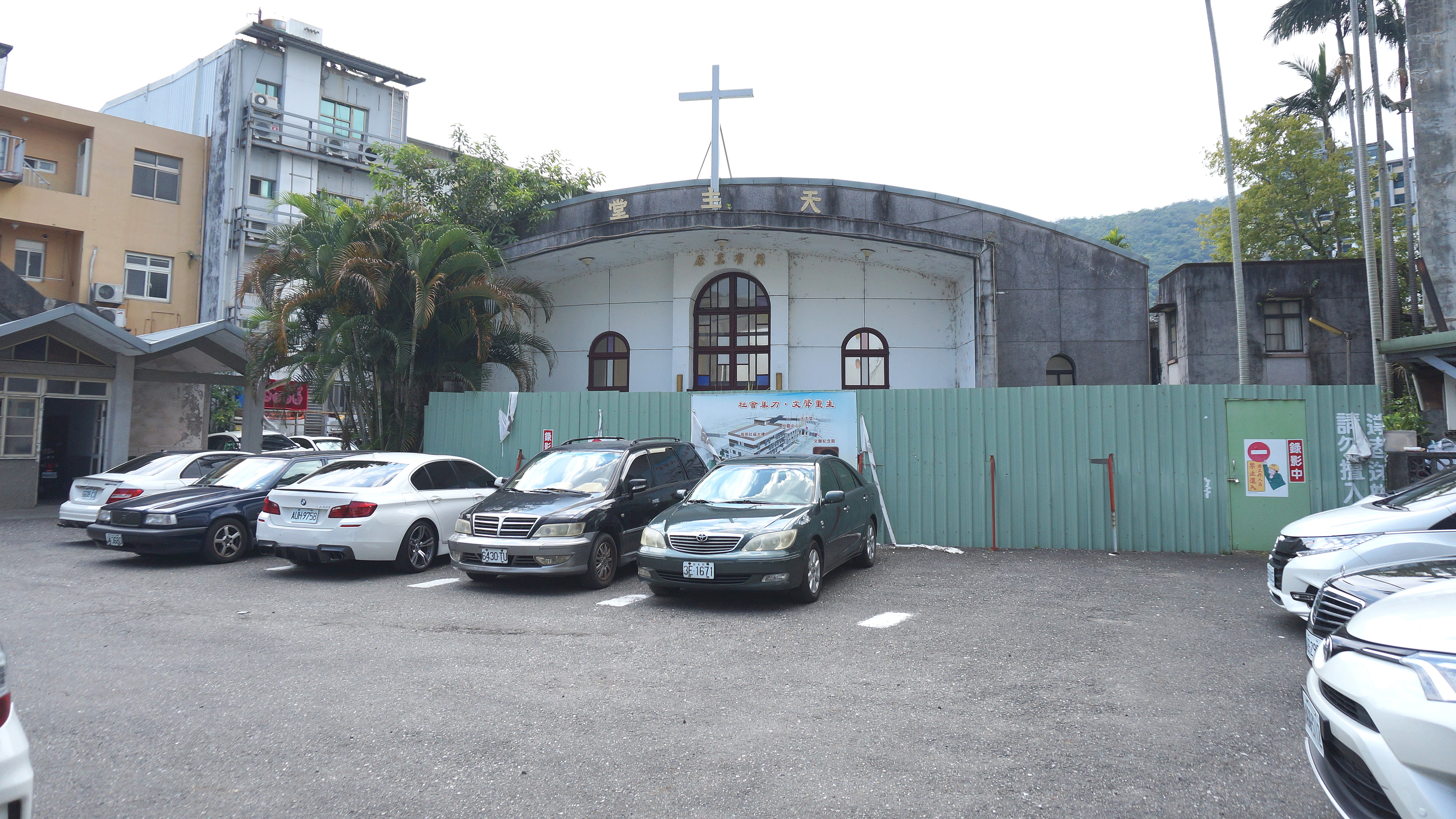 中文（台灣）: 礁溪聖若瑟堂，俗稱礁溪天主堂，地址：宜蘭縣礁溪鄉礁溪路五段42號。前方為戶外停車場。